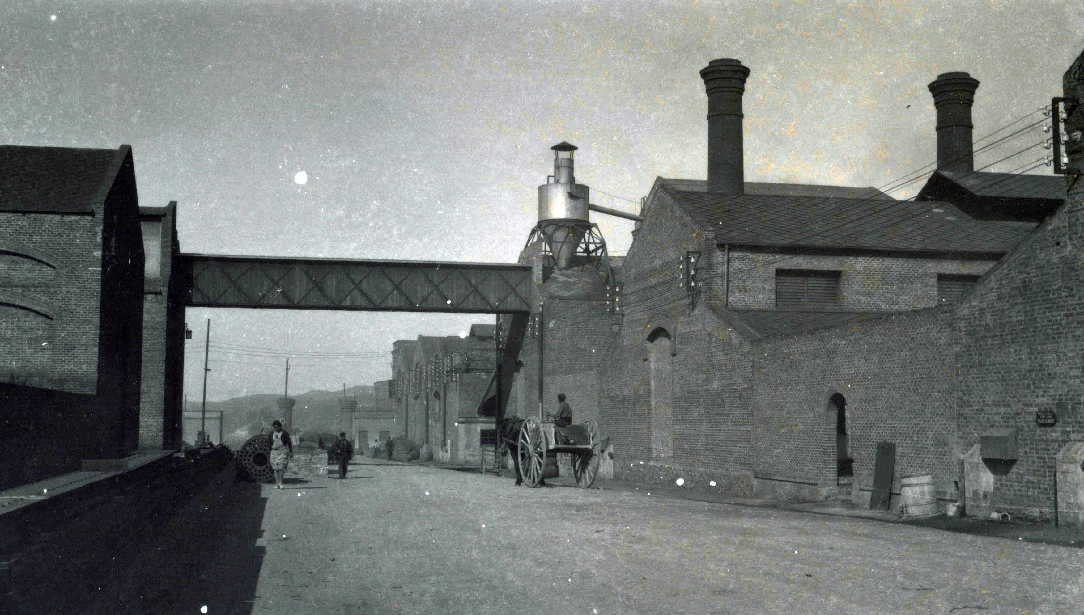 Passeig central de la Bòbila Nova - Manufacturas del Corcho Armstrong S.A- Palafrugell. Arxiu d'imatges Museu del Suro (Fons Armstrong)